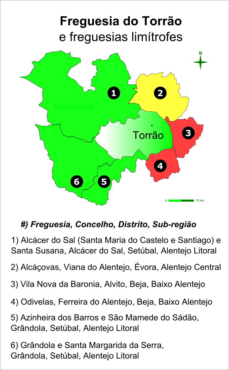 Torrão (Alcácer do Sal) e as freguesias limítrofes. Baseado na Carta Administrativa Oficial de Portugal (CAOP).